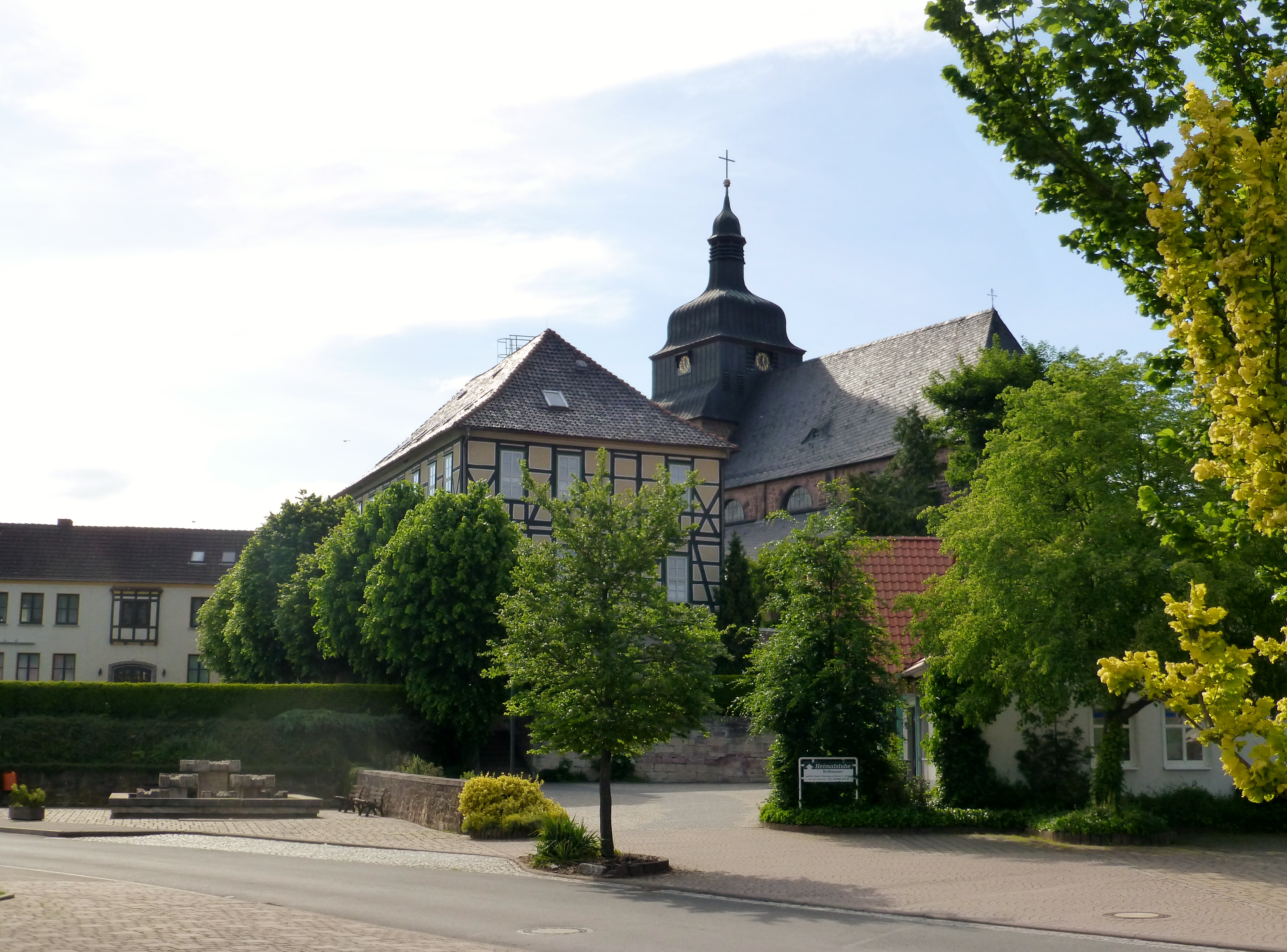 Blick auf den ehemaligen Oberhof und Kirche in Ershausen